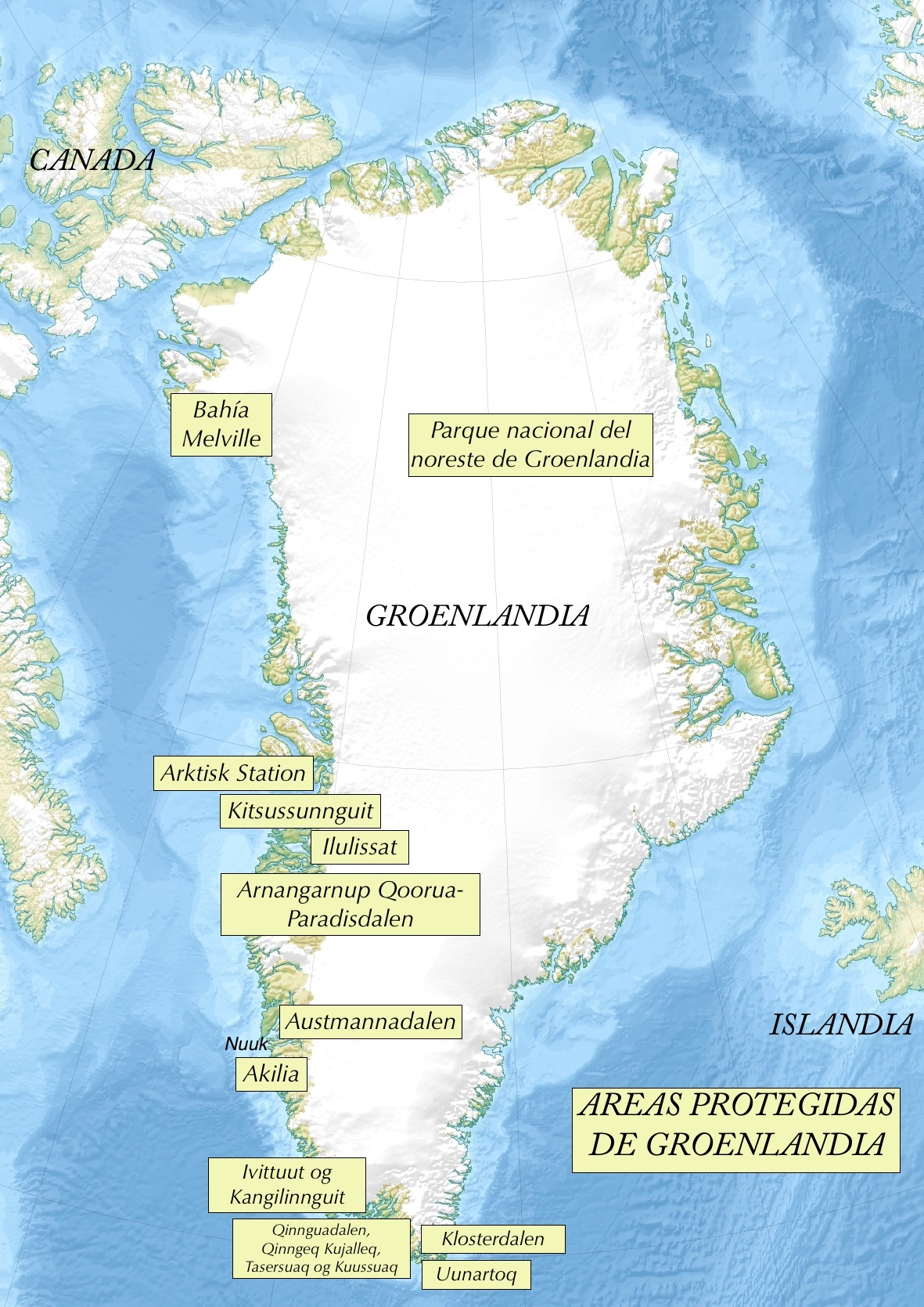 Mapa de zonas protegidas de Groenlandia